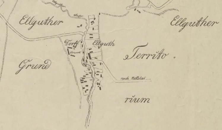 Ellguth bei Gleiwitz im Jahr 1812. Zeichnung von 1911 nach alten Karten.